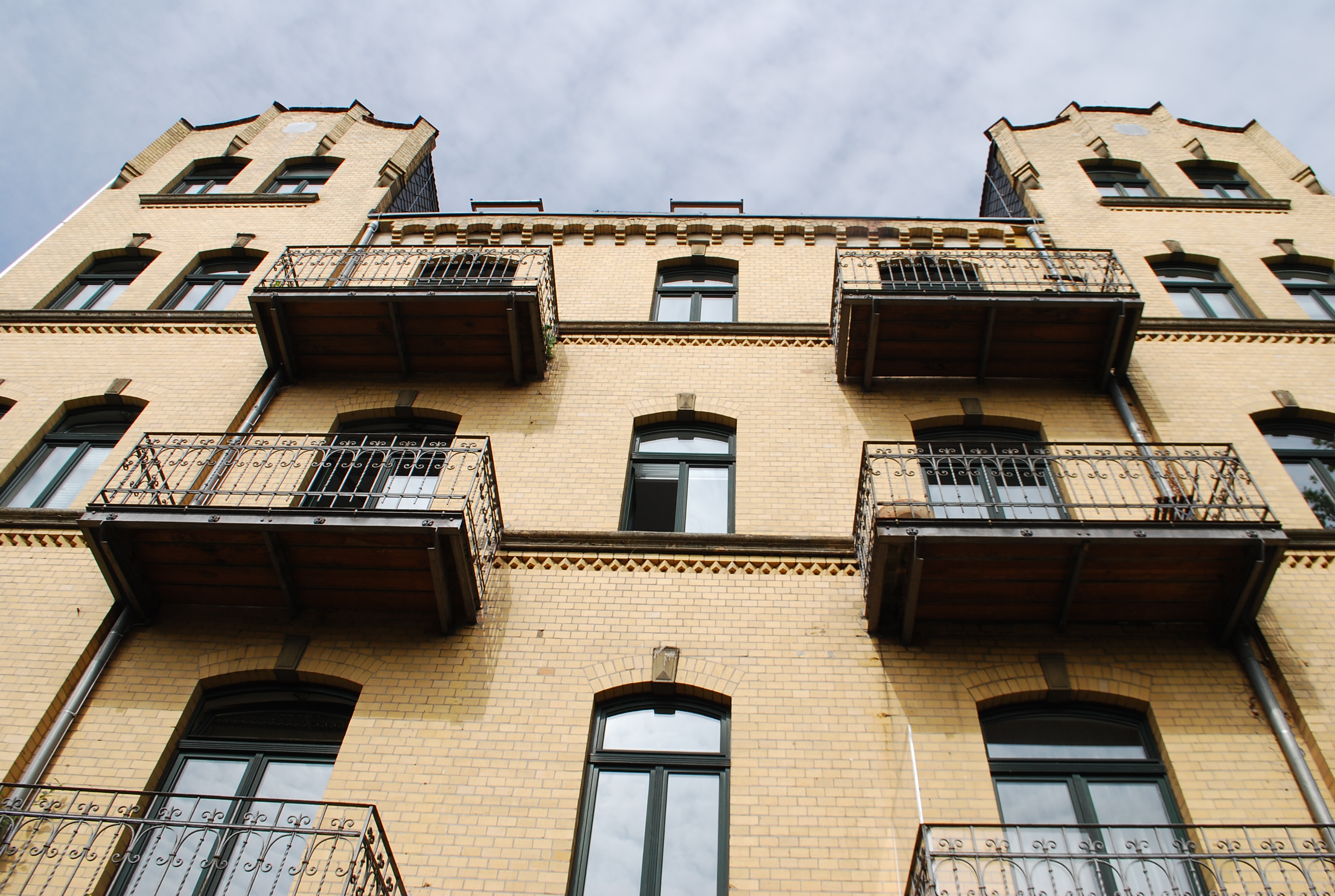 INCHER-Kassel Vorderansicht